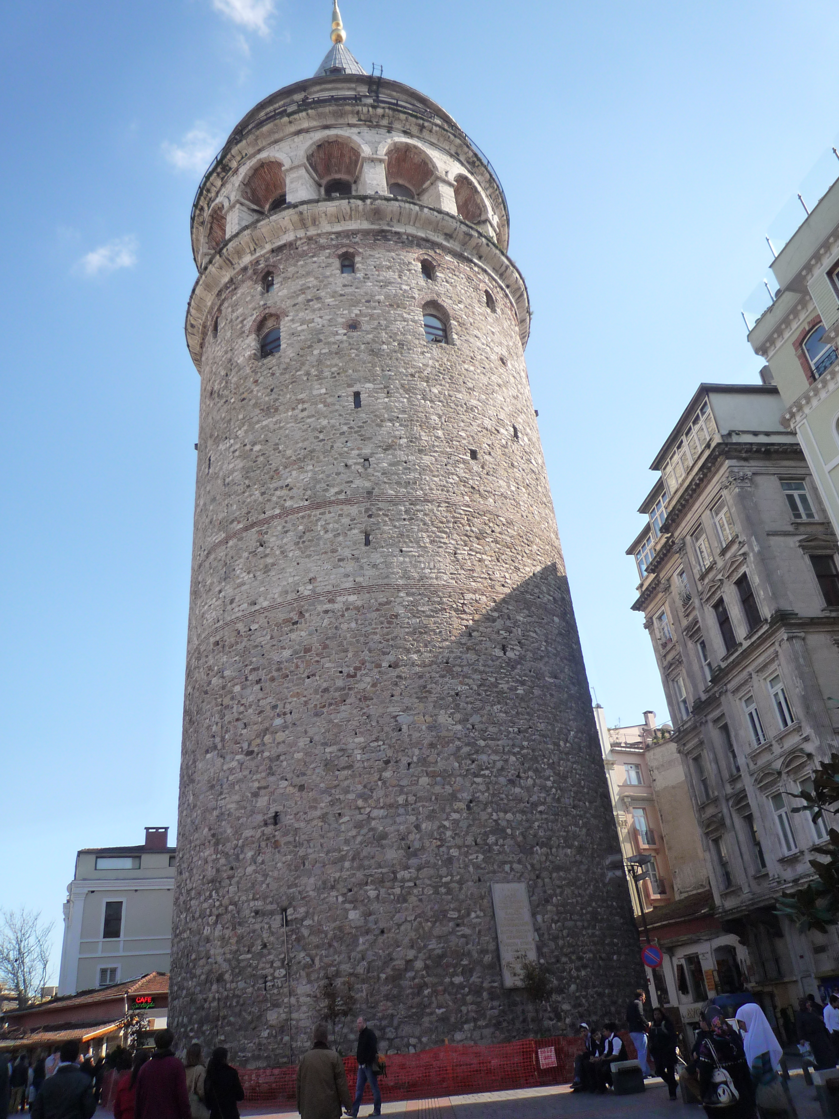 Torre de Gálata en Estambul